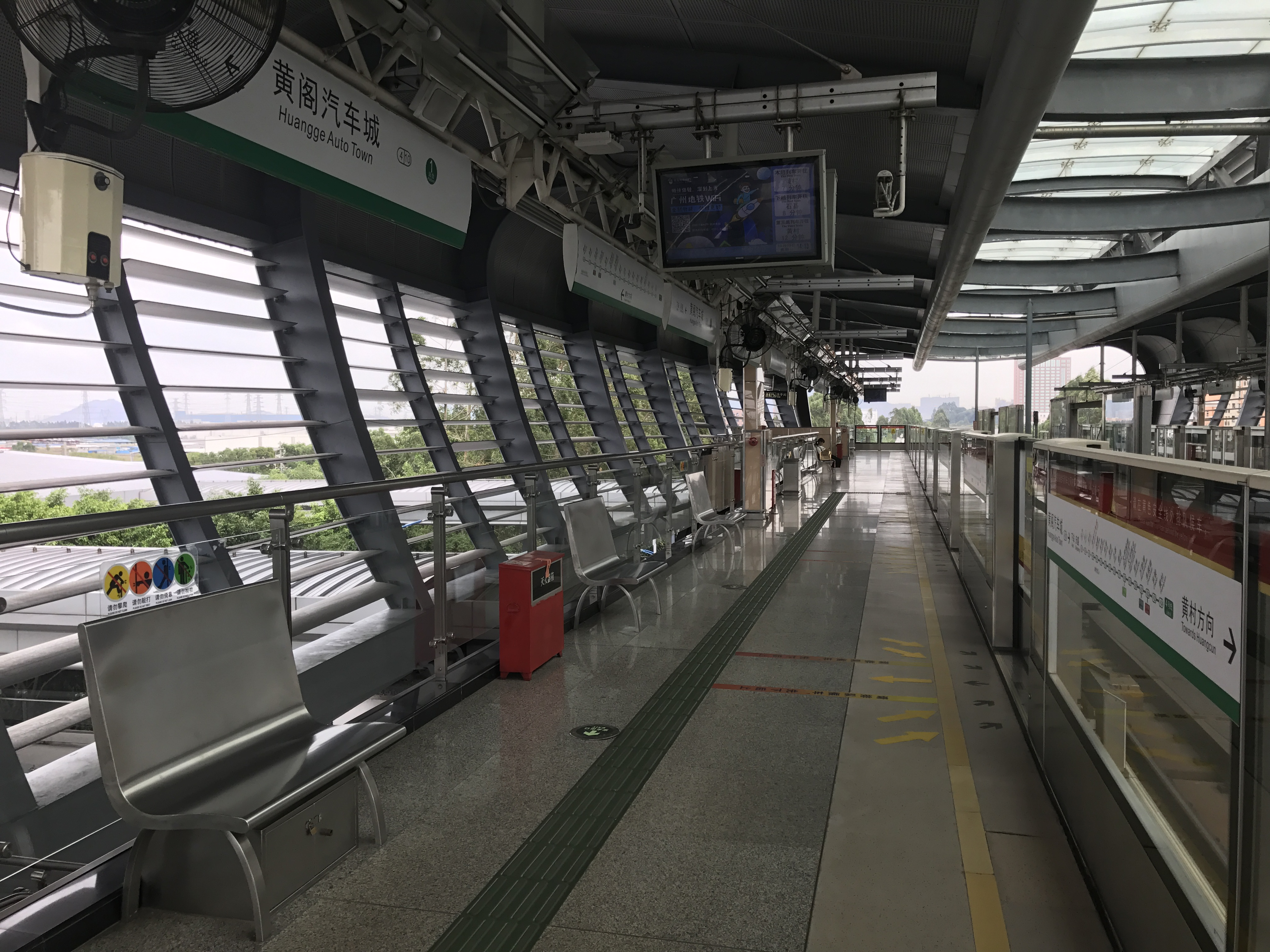 广州地铁黄阁汽车城站